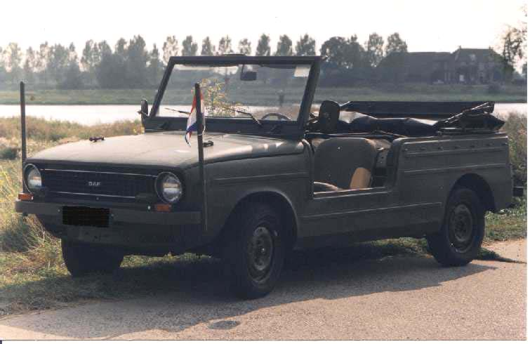 DAF 66 YA 1975